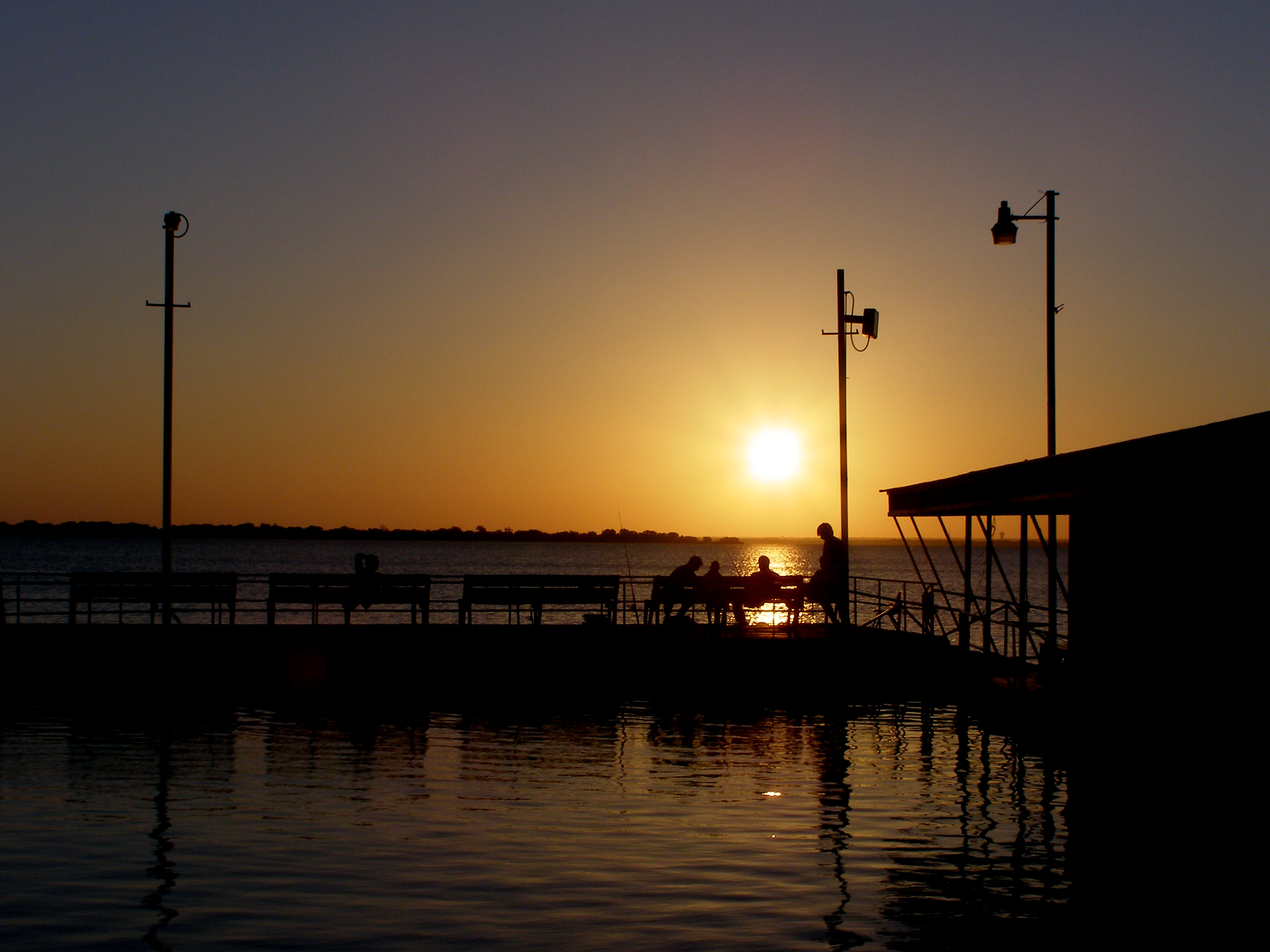 Lake Lewisville at night